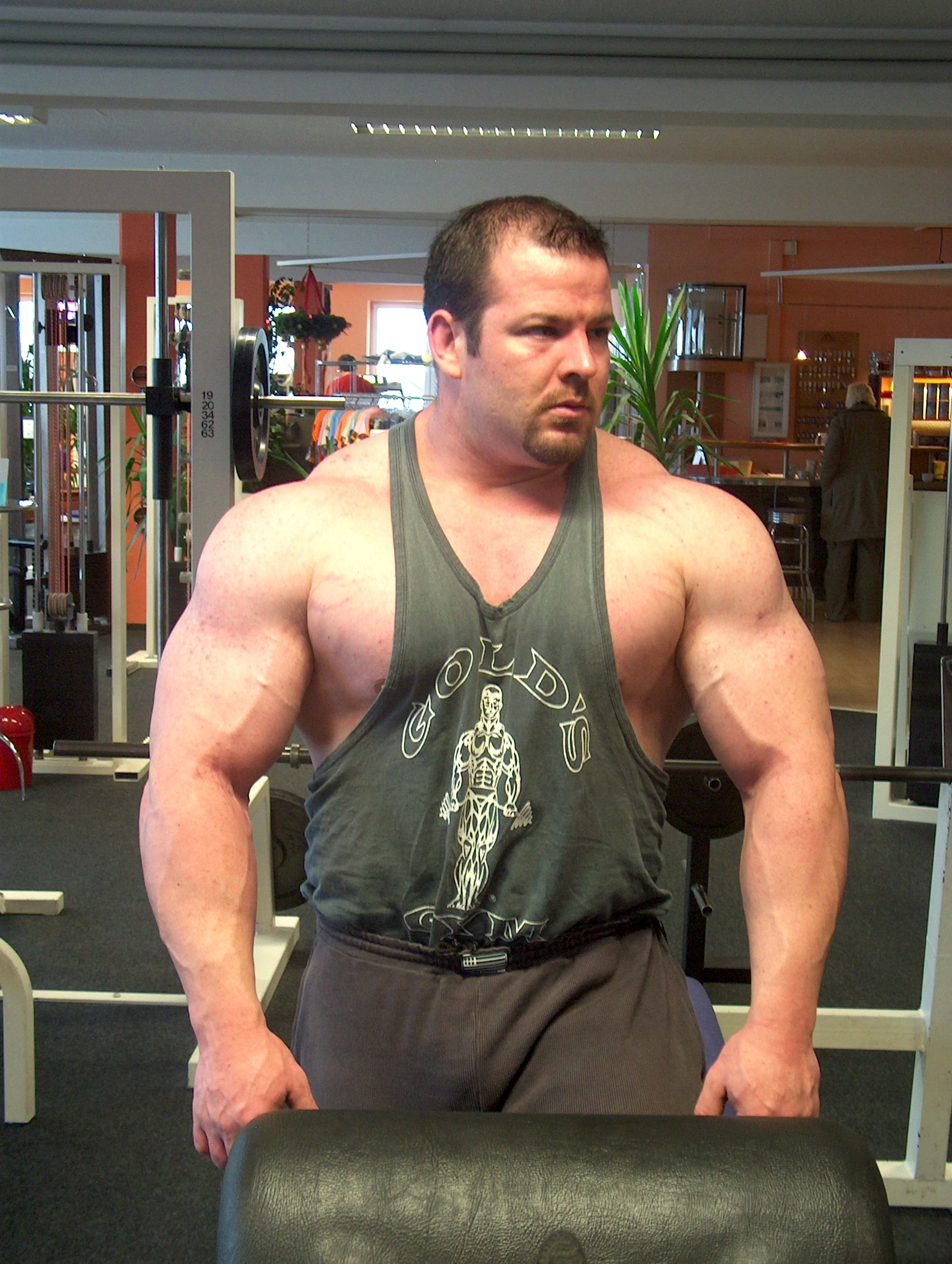 Der deutsche Kraftdreikämpfer Dietmar Zint beim Training